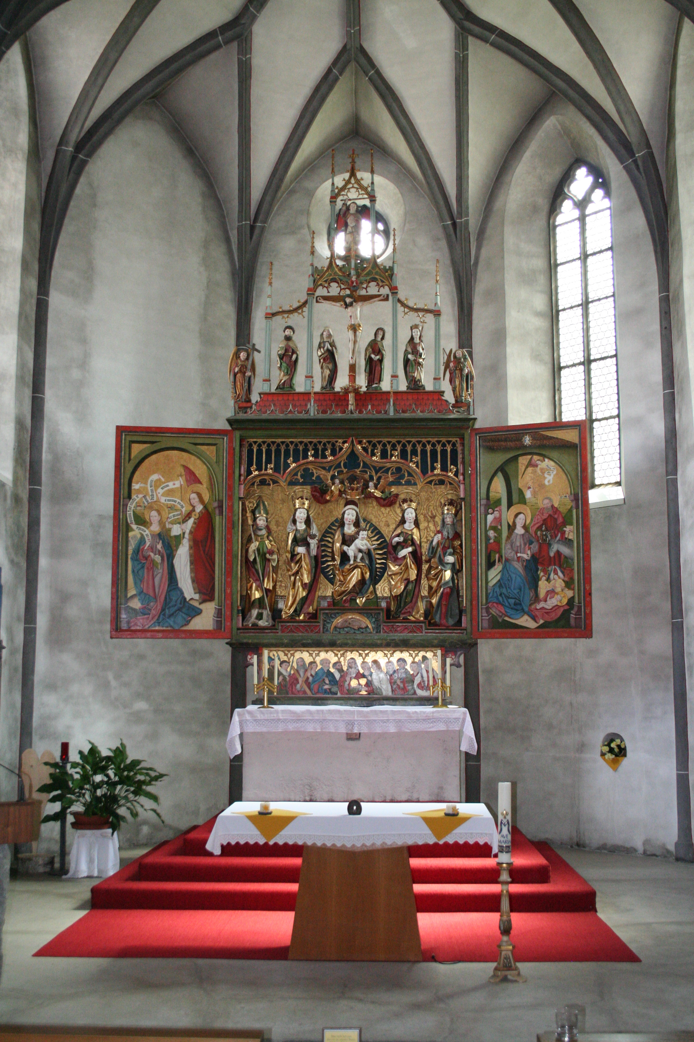 Kirche St. Maria und Michael in Churwalden, Hochaltar